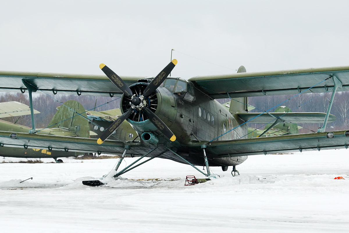 An-2 on skis